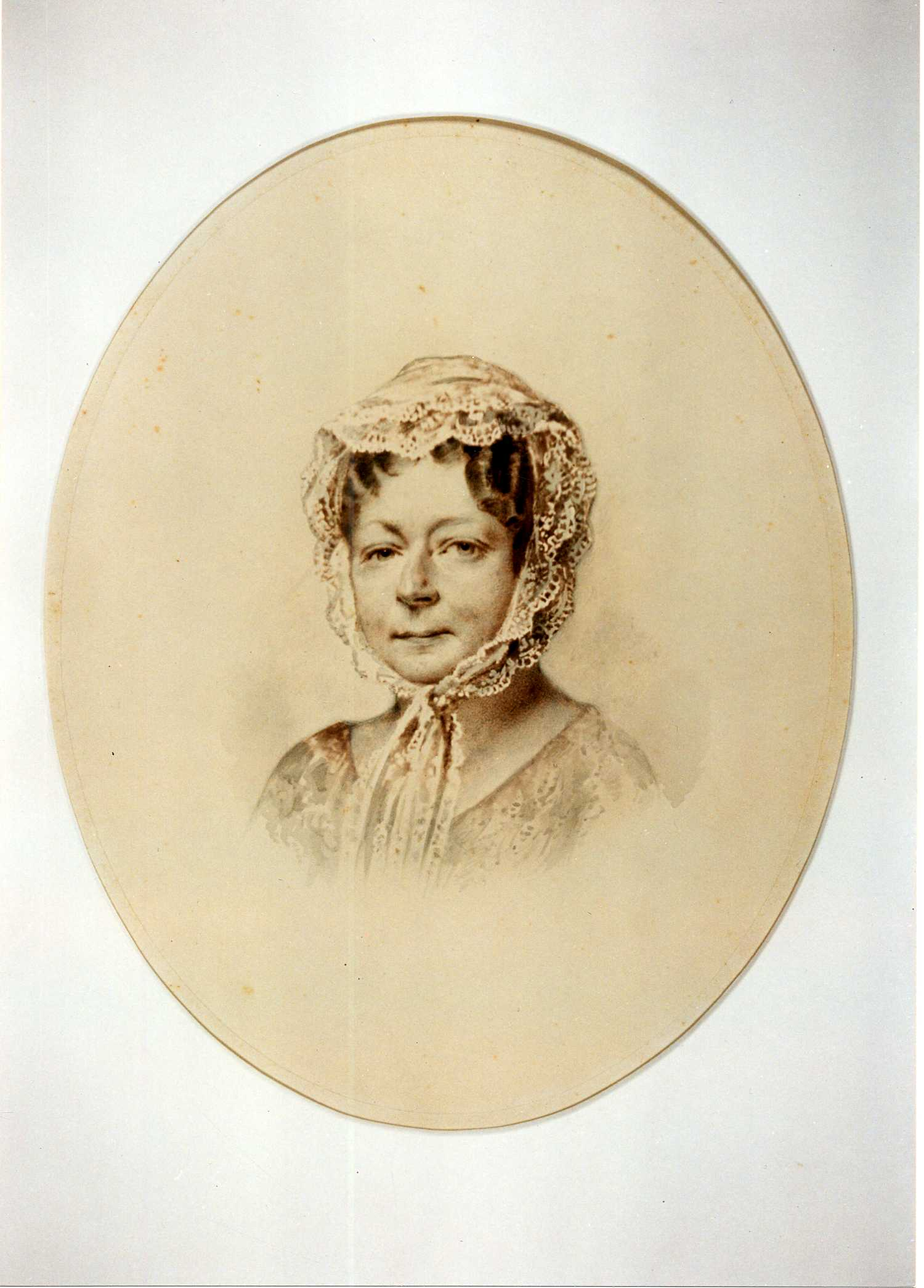 Lucie Fürstin von Pückler-Muskau, Nachkolorierte Fotoaufnahme, um 1853, Foto: O. Schubert, 1998, Stiftung Fürst-Pückler-Museum Park und Schloss Branitz